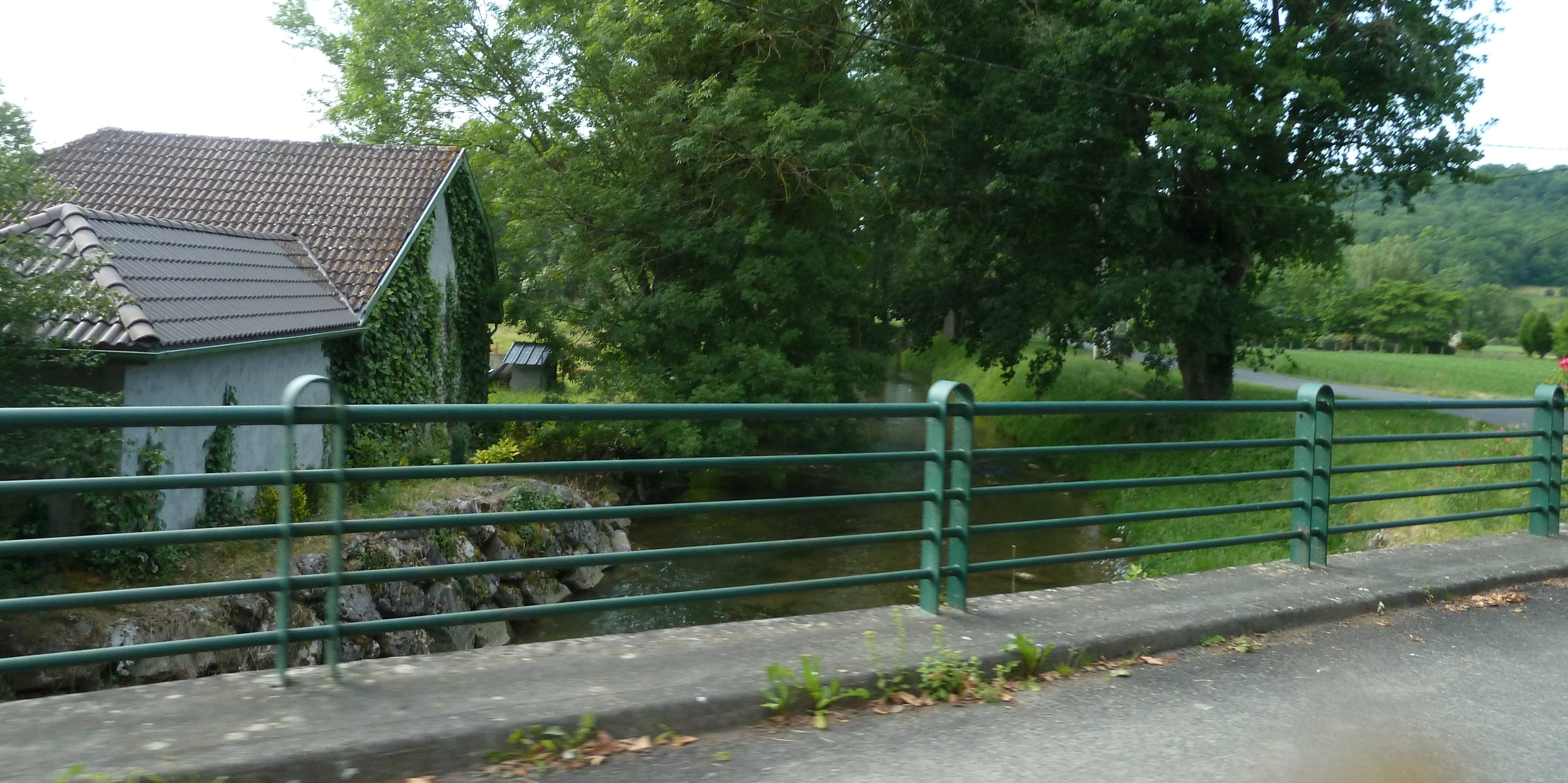 Le Lagoin à Angaïs, France.